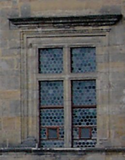 Steinkreuzfenster, Ausschnitt aus einem Foto von der Prager Burg